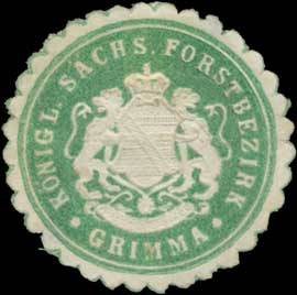 Sealing stamp Title: Königl. Sächs. Forstbezirk Grimma Description: grün, weiß, geprägt Place: Grimma size: 3 cm